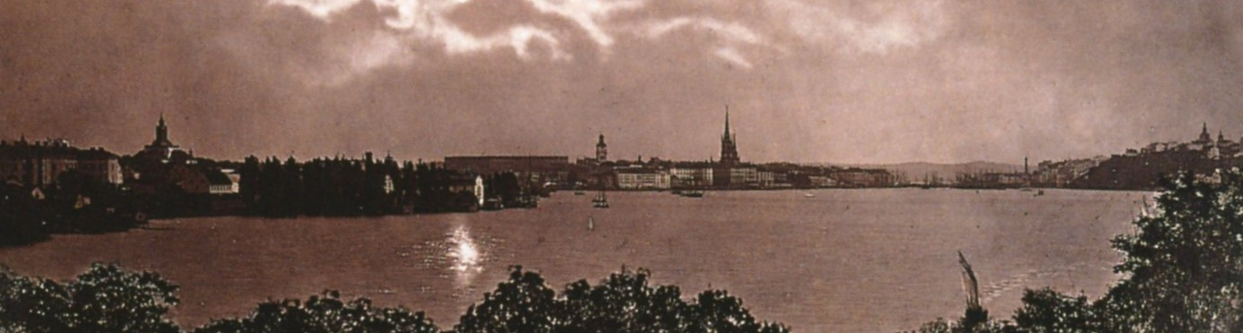 Stockholm i månsken från Marieberg på Kungsholmen